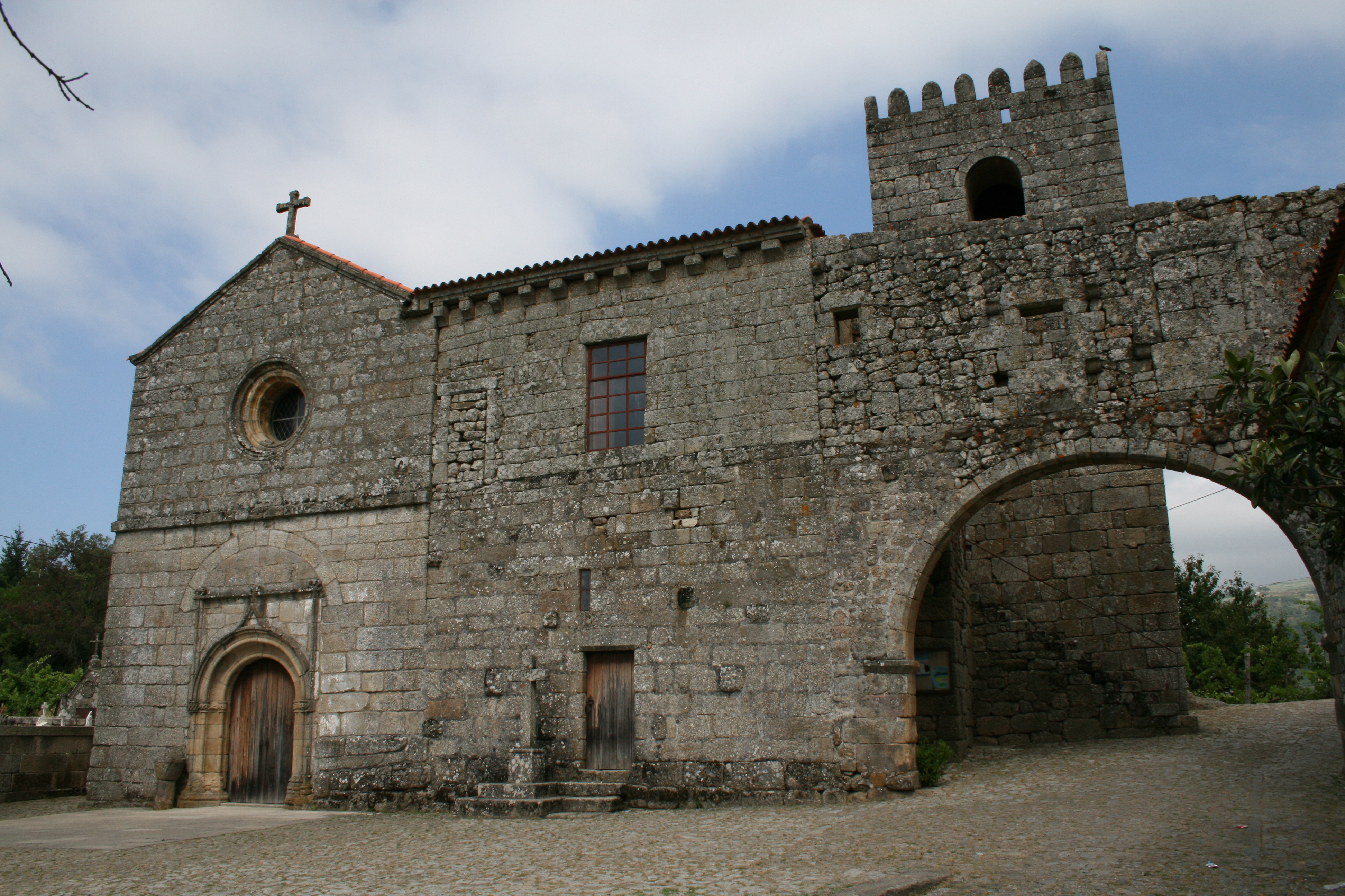 Igreja Matriz de Cárquere, Resende, Viseu